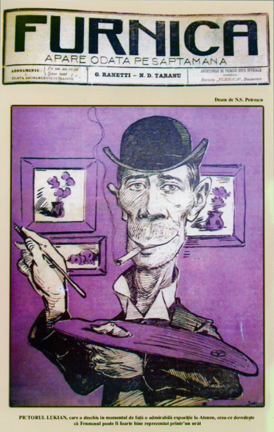 Pictorul Ștefan Luchian in Revista Furnica, anul I, no. 14, din data de 19 decembrie 1904. Caricatură a apărut pe coperta revistei Furnica, însoţită de textul: "Pictorul Lukian care în momentul de faţă a deschis o admirabilă expoziţie la Ateneu, ceea ce dovedeşte că Frumosul poate fi foarte bine reprezentat printr-un urât"